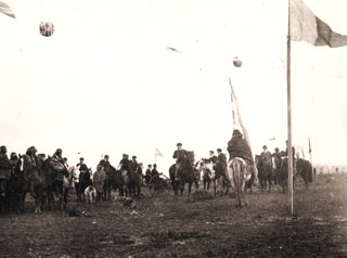 Integrantes del pueblo tehuelche festejando el 25 de mayo en 1889 en Río Gallegos, enarbolando la bandera argentina.